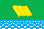 Флаг Собинки Владимирской области